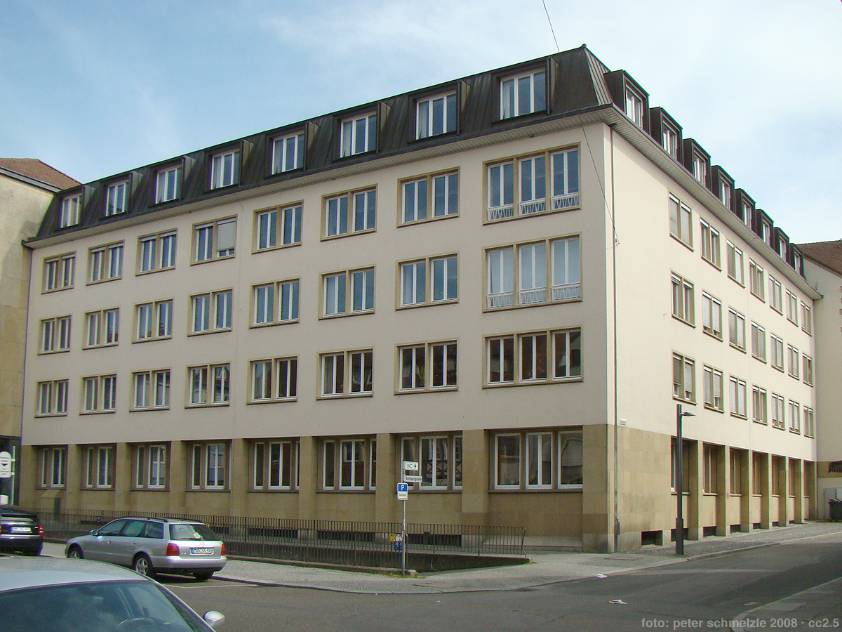 Rathaus in heilbronn, erster Erweiterungsbau der Nachkriegszeit